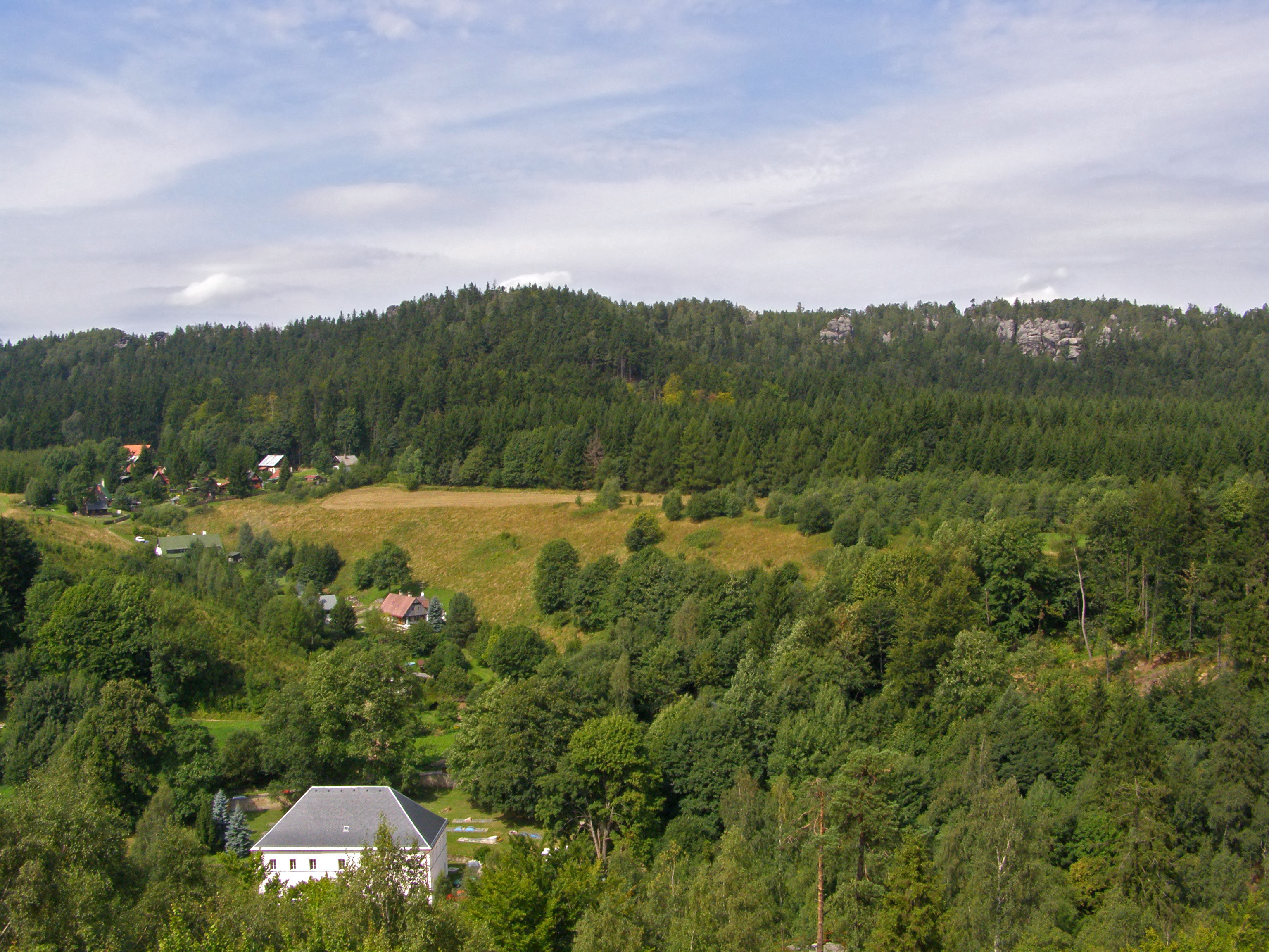 Adršpašskoteplické skály, osada Skály, v pozadí vrchol Čáp, pohled z vrcholu Skály